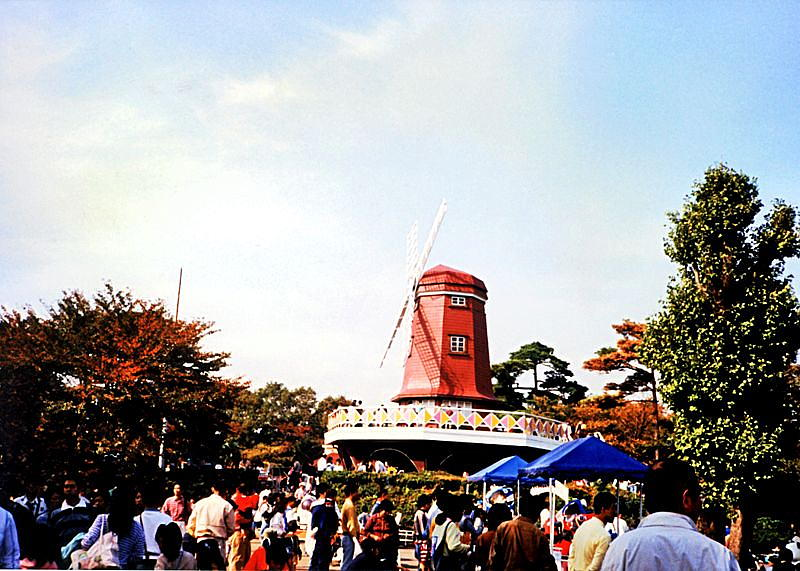 埼玉県所沢市にあった遊園地「ユネスコ村」のシンボルだったオランダ風車。閉園前日の1990年11月3日に撮影。